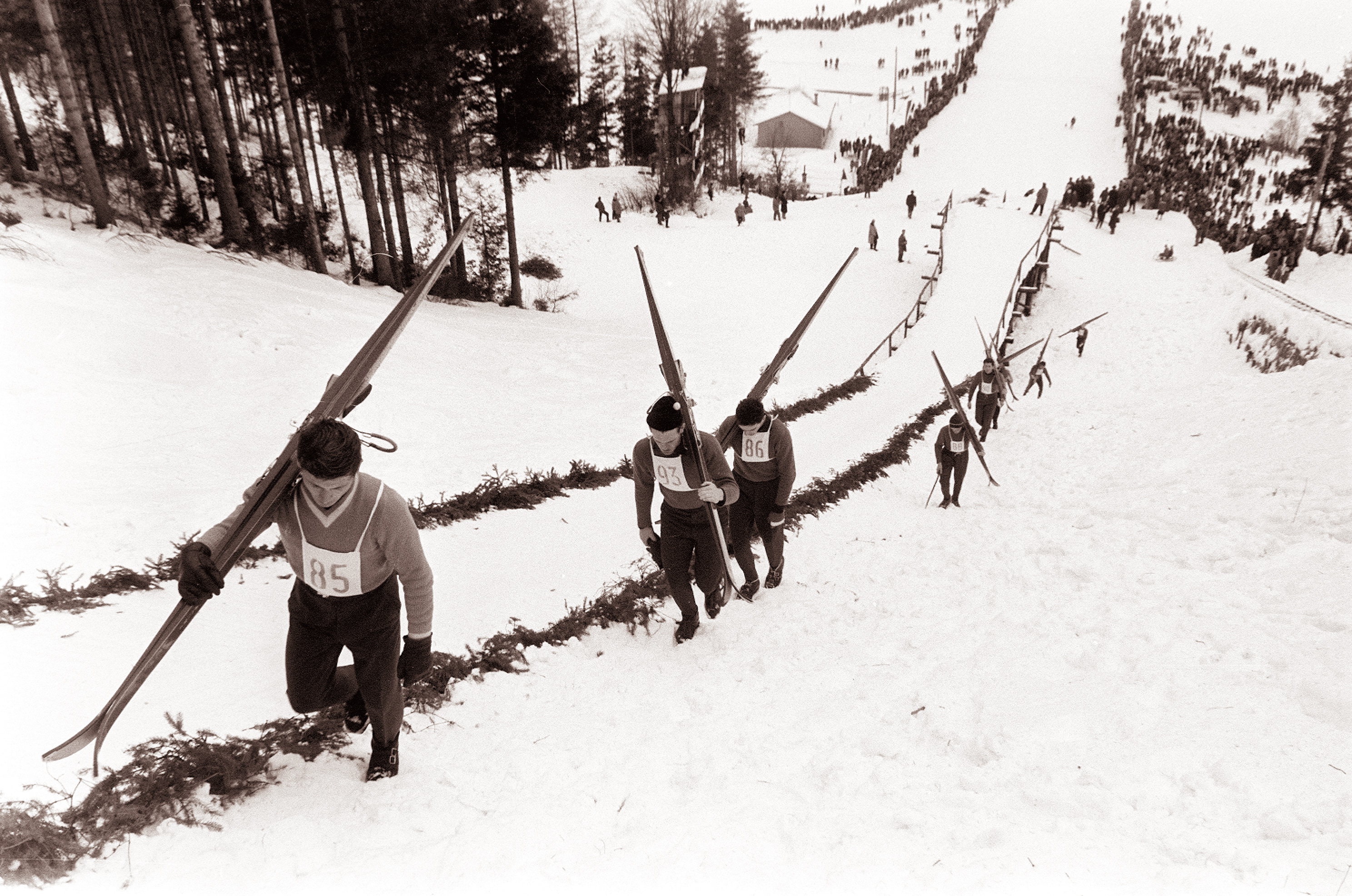 17. državno prvenstvo v smučarskih skokih v Črni na Koroškem